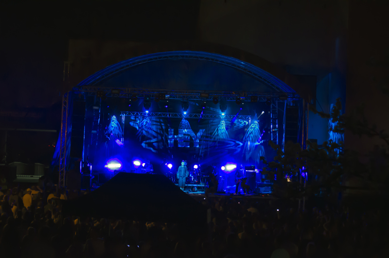 Koncert Hey na Rock May Festval 2012